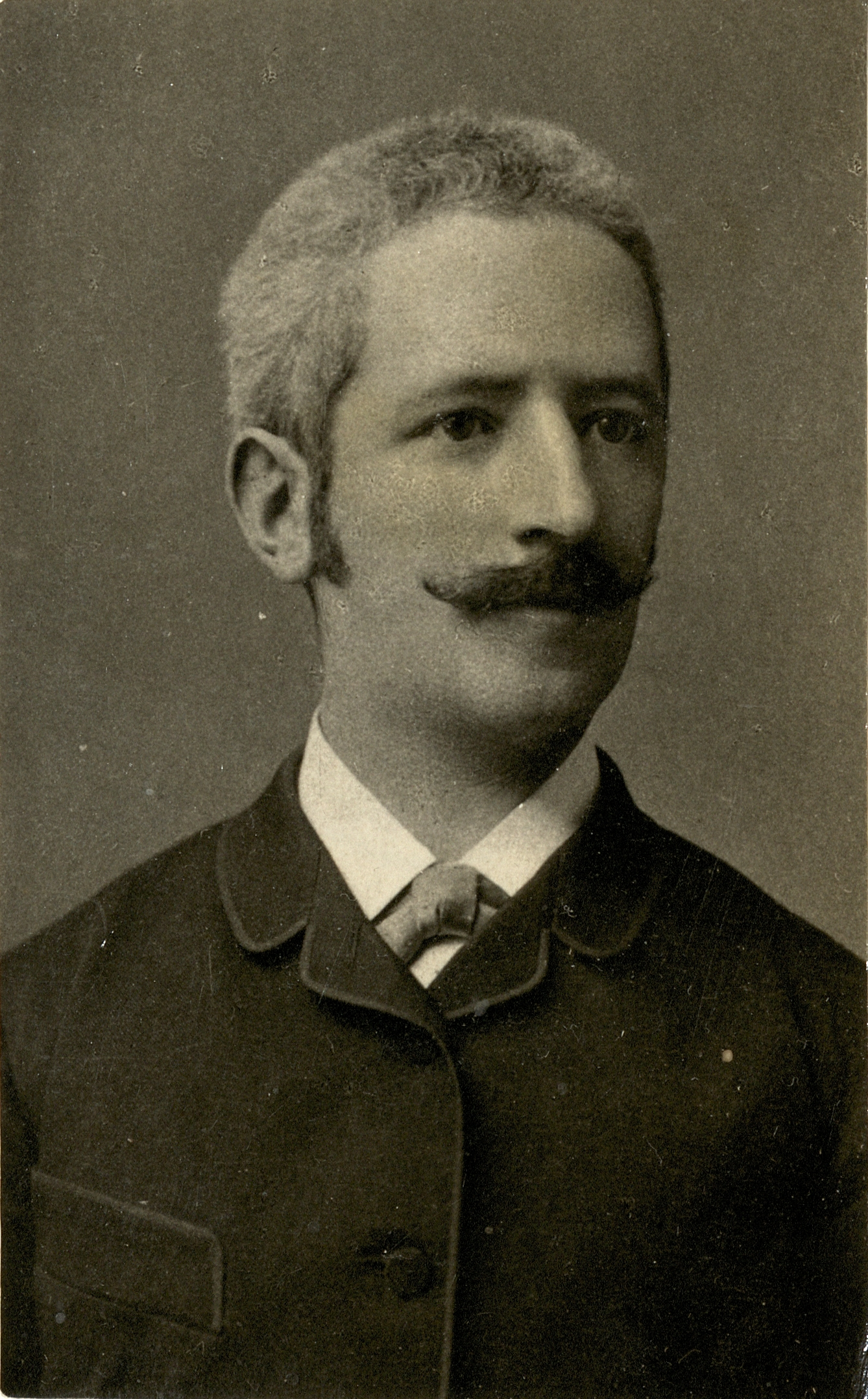 Viktor Parma (1858-1924), Slovene composer.